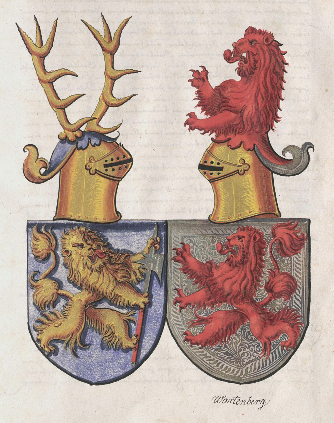 Wappen aus der Zimmerischen Chronik, Handschrift B, Württembergische Landesbibliothek Stuttgart, Cod. Don. 580a, S. 43, Allianzwappen Zimmern / Wartenberg